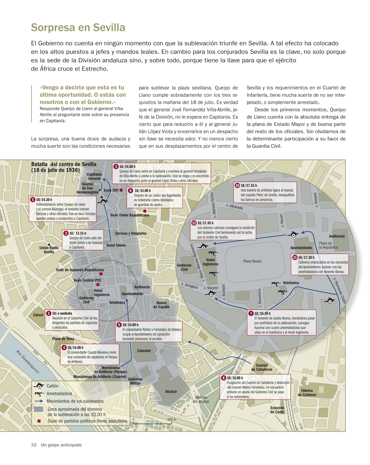 Infografía que narra los combates ocurridos el 18 de julio de 1936 en el centro de Sevilla al comenzar la sublevación militar en esta ciudad. Página 32 del libro "La sublevación", de Víctor Hurtado (DAU, 2011).